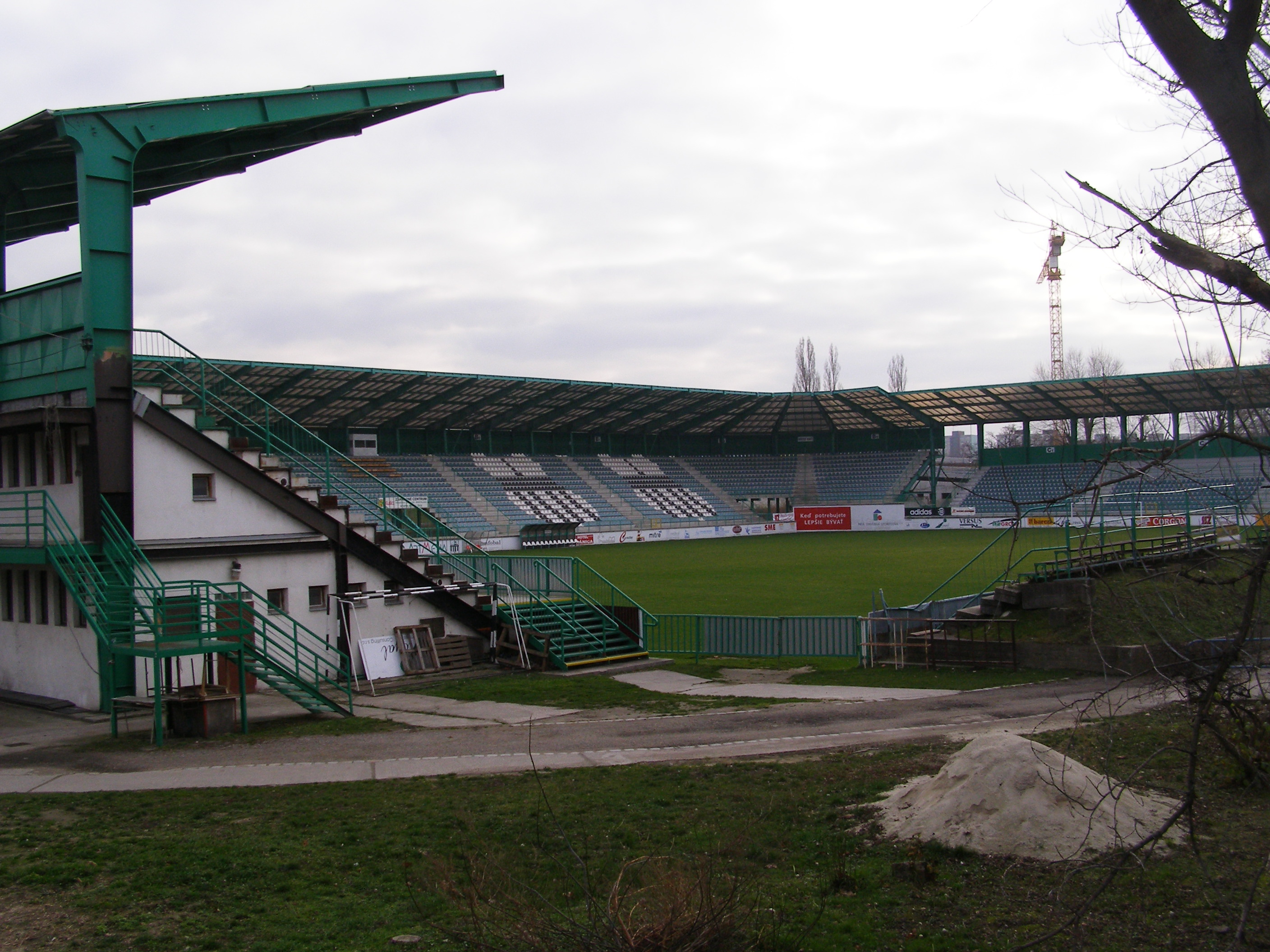 Artmedia Petržalka Stadium, Pri Starom háji street, Petržalka, Bratislava, Slovakia